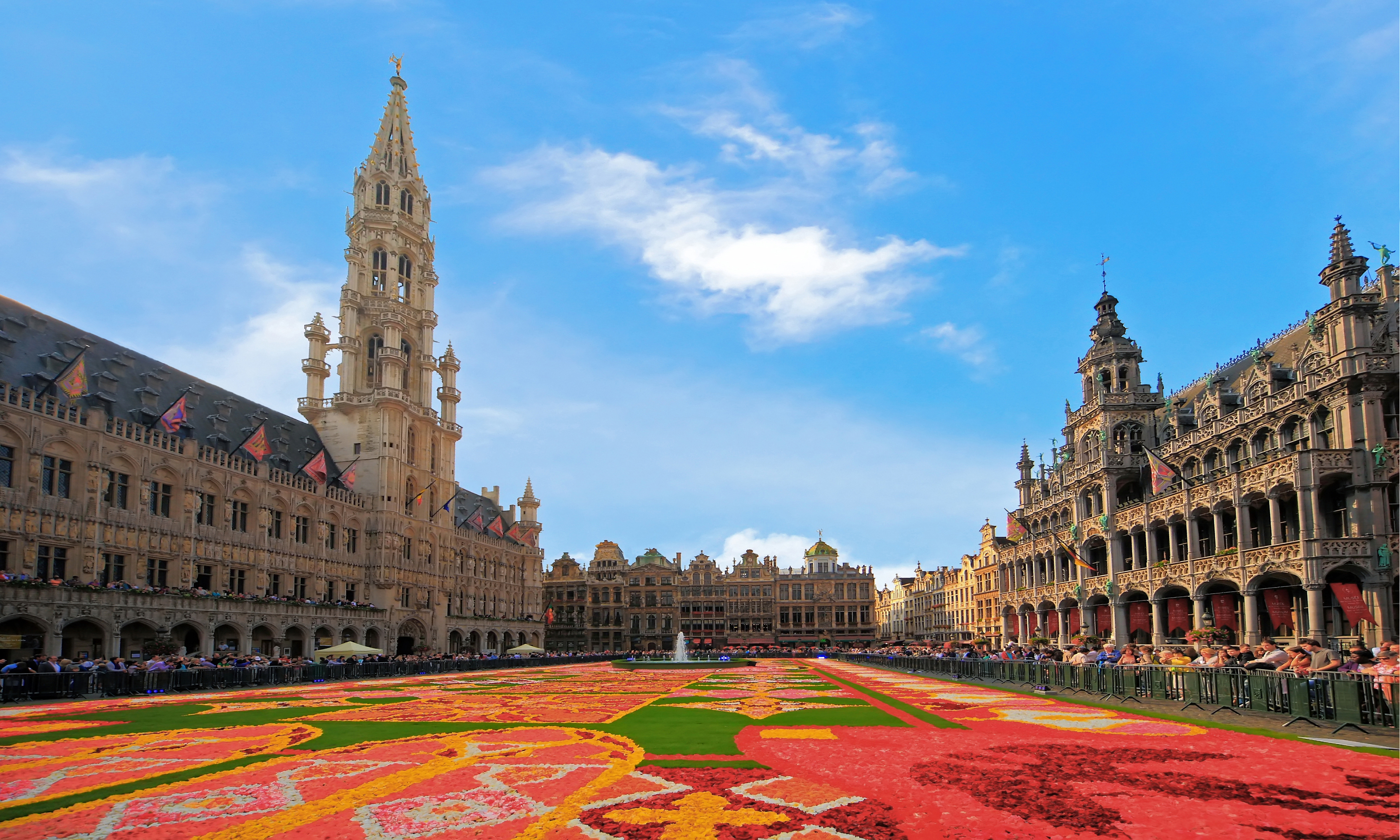 La alfombra de begonias más grande del mundo en un evento que tiene lugar en agosto cada dos años.